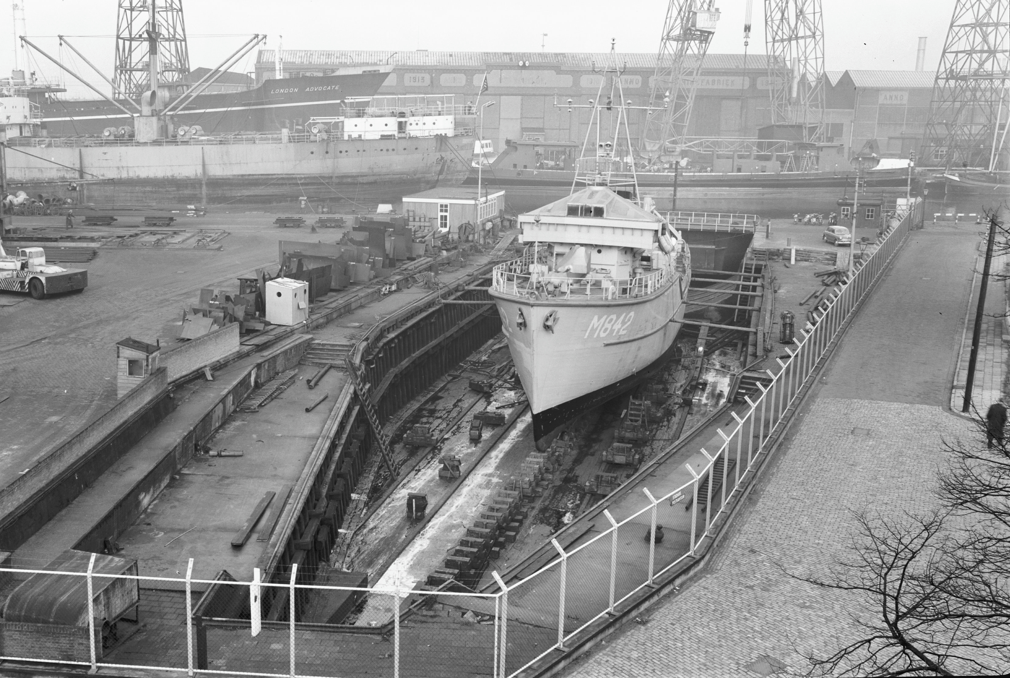 Dok, bij Stenen Beer